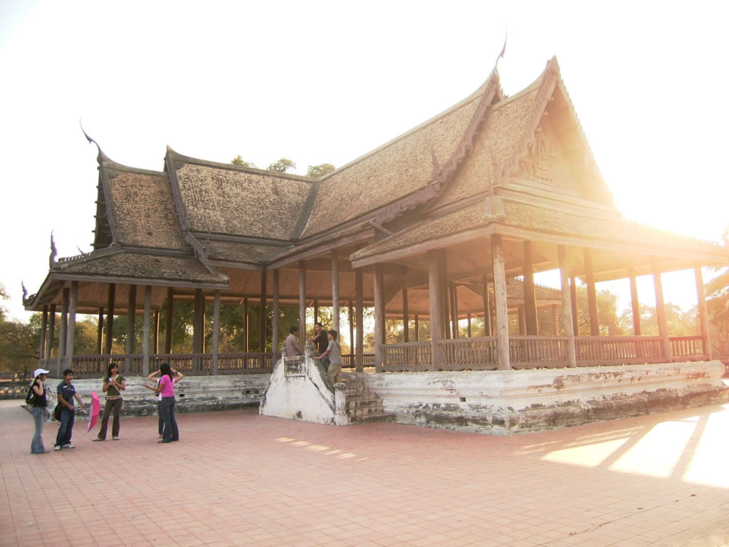 พระที่นั่งตรีมุข พระราชวังโบราณ อยุธยา สัญญาอนุญาต The present photo is taken or owned by Thanyakij. The camera used was: Ricoh Caplio GX. หมวดหมู่:อุทยานประวัติศาสตร์พระนครศรีอยุธยา หมวดหมู่:ภาพสถานที่ ในจังหวัดพระนครศรีอยุธยา